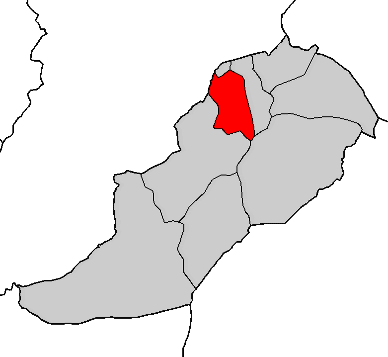 Situación da parroquia de Mor no concello de Alfoz